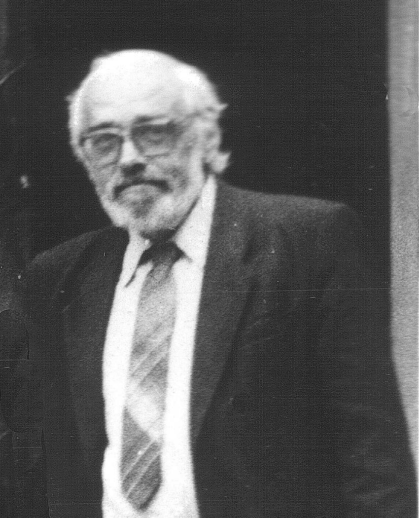 Vadim Klevayev. Middle of 1990s. В.М.Клеваев.Середина 1990-х гг